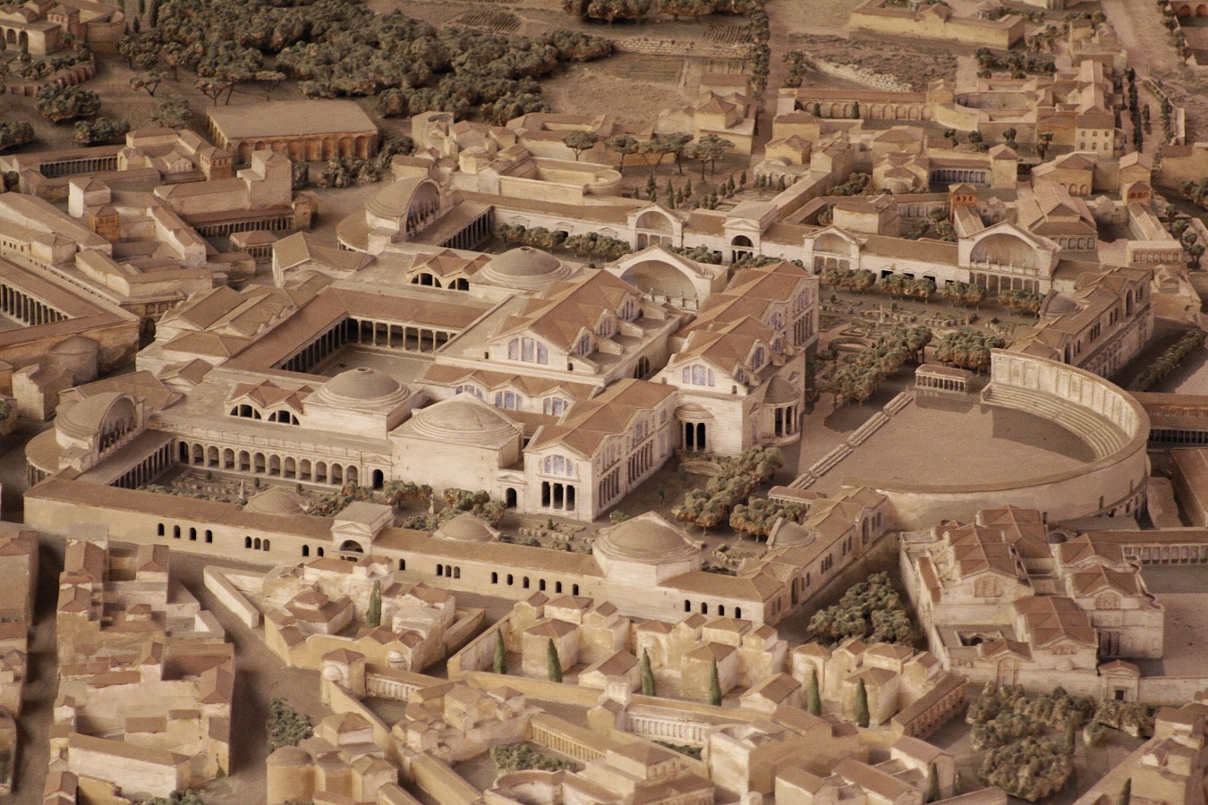 Thermes de Trajan sur la maquette d'I. Gismondi. Museo della Civilta Romana, EUR, Rome.